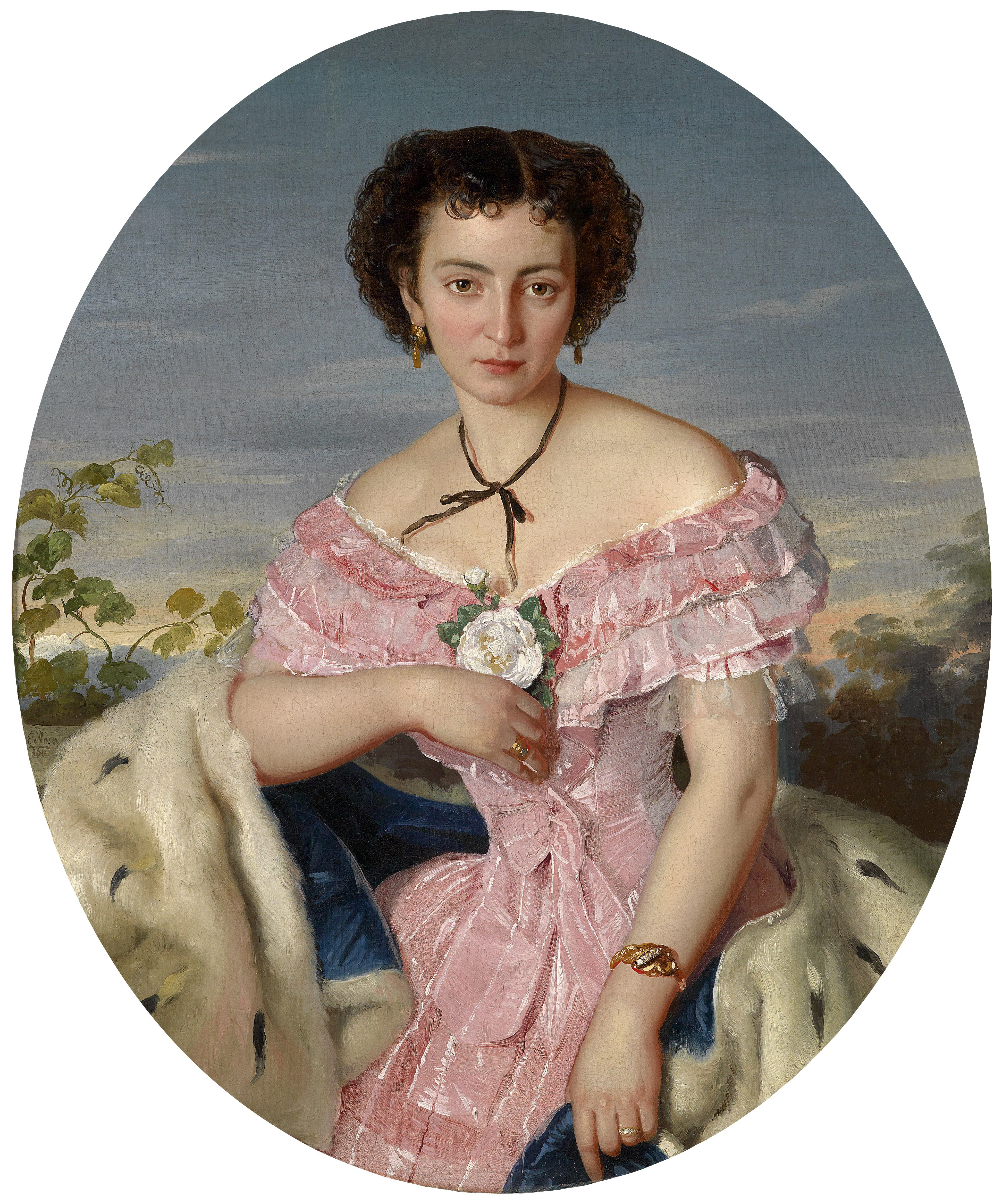 Portrait der Sängerin Philippine von Edelsberg (1838-1917; Hofopernsängerin in Berlin), laut rückseitigem alten Etikett, signiert, datiert, E. Moser (1)860, Öl auf Leinwand, 97 x 82 cm